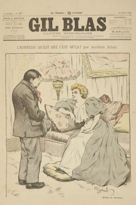 L'Honneur, qu'est-ce que c'est qu'ça ?, a short story by French writer, journalist and playwright Aurélien Scholl (1833-1902). Illustration by Henri Gerbault (1863-1930) in Le Gil Blas illustré, 24 March 1896.